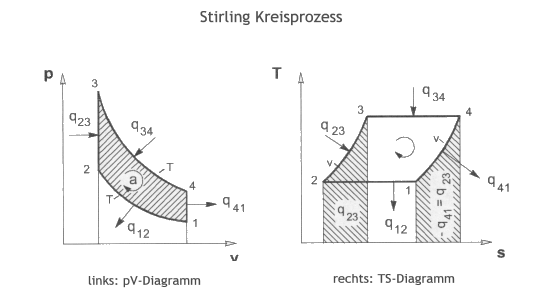 Diagramm pV-Ts-Kreisprozess